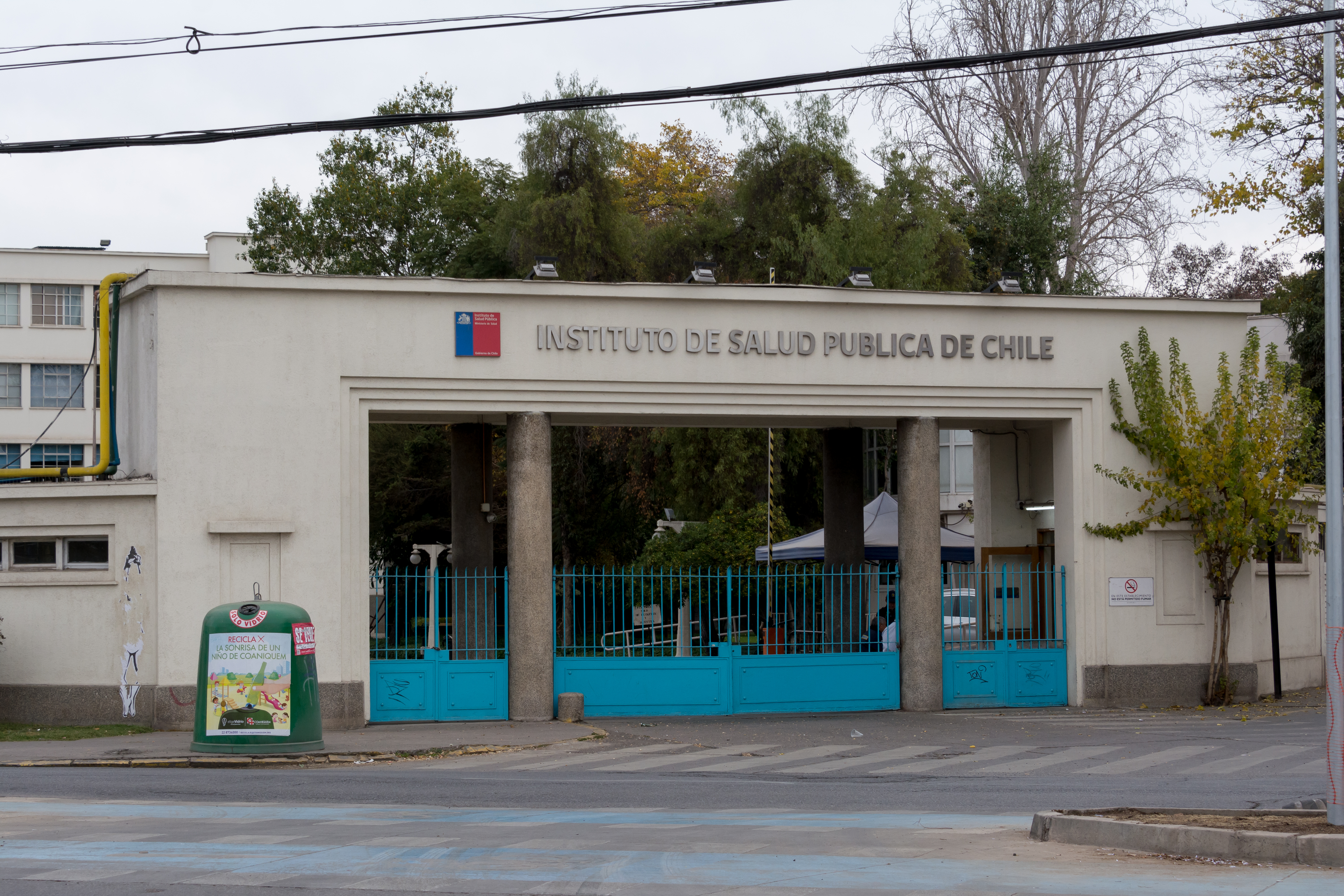 Instituto de Salud Pública, Ñuñoa, Santiago, Chile.